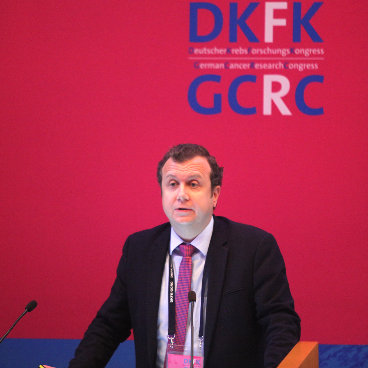 Lars Zender, bei einem Vortrag beim 1. Deutschen Krebsforschungskongress am 4. Februar 2019 in Heidelberg